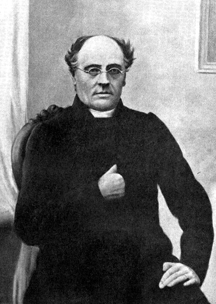 Finnish poet Johan Ludvig Runeberg, 1804-1877